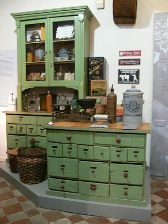 Ladeneinrichtung im Museum für Thüringer Volkskunde, Erfurt.